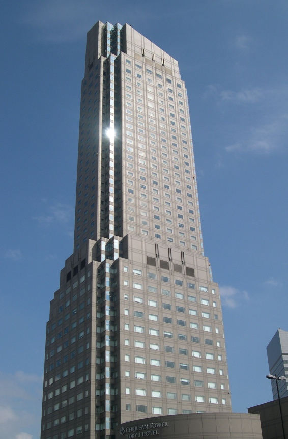 CERULEAN TOWER Tokyu Hotel, Sakuragaoka, Shibuya, Tokyo, Japan. Date:2005-10-07 Photo:user:Takahashi 渋谷区桜ヶ丘 セルリアンタワー東急ホテル